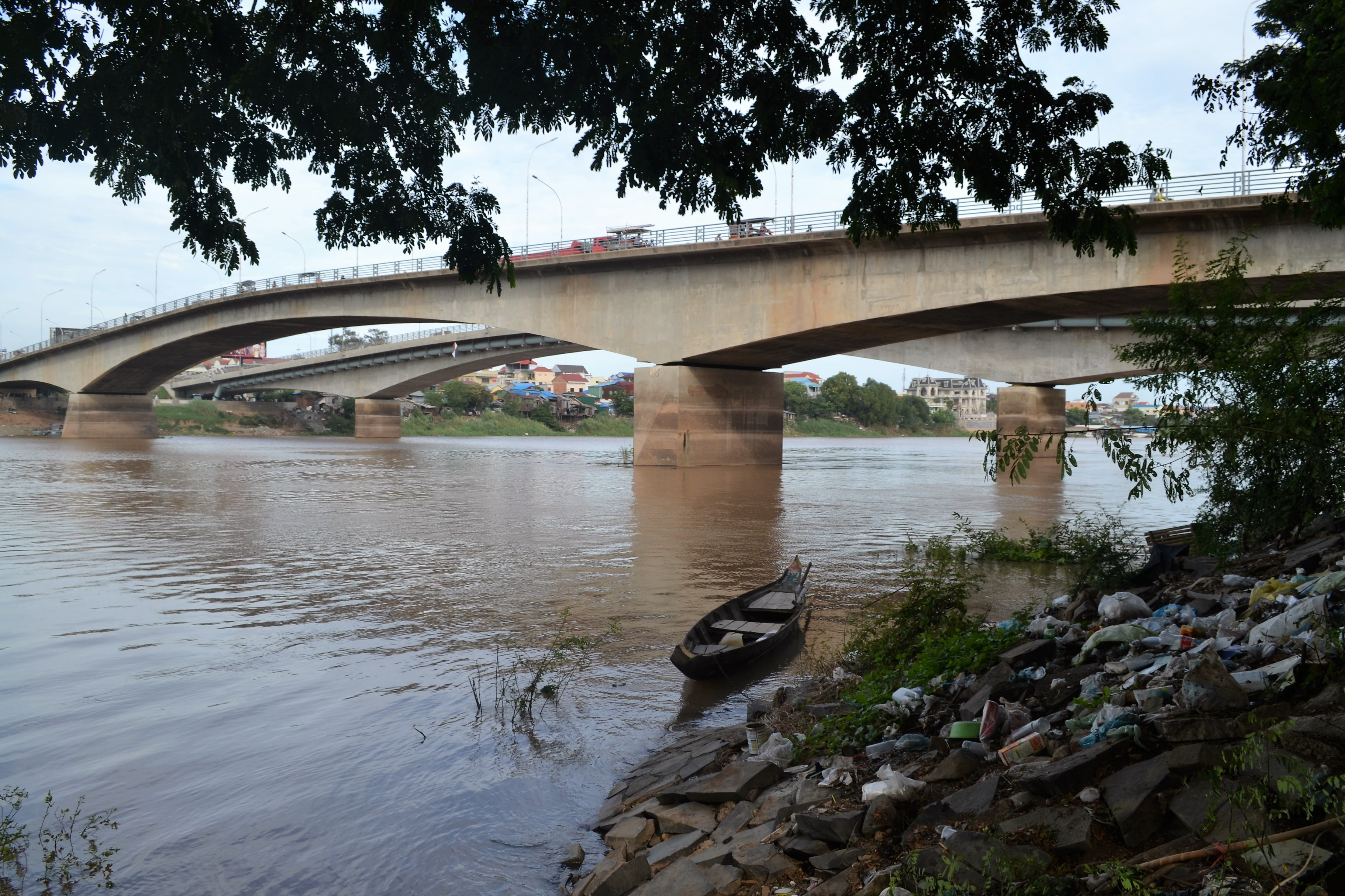 vue côté nord